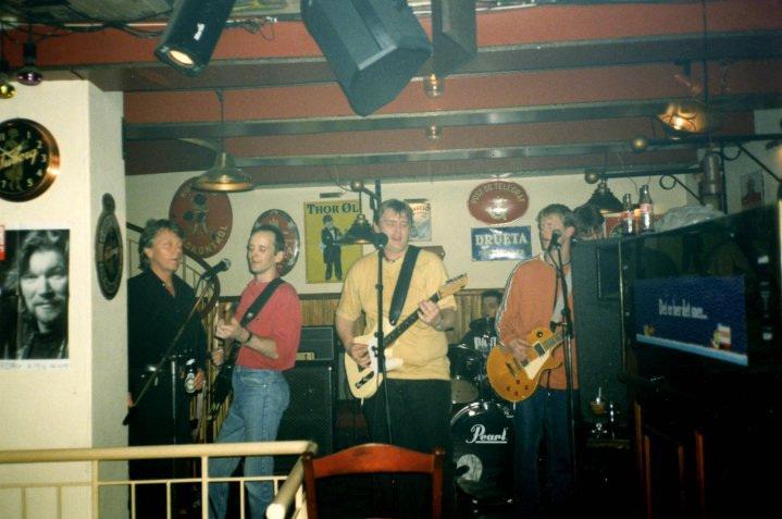 GasJam sammen med Willi Jønsson